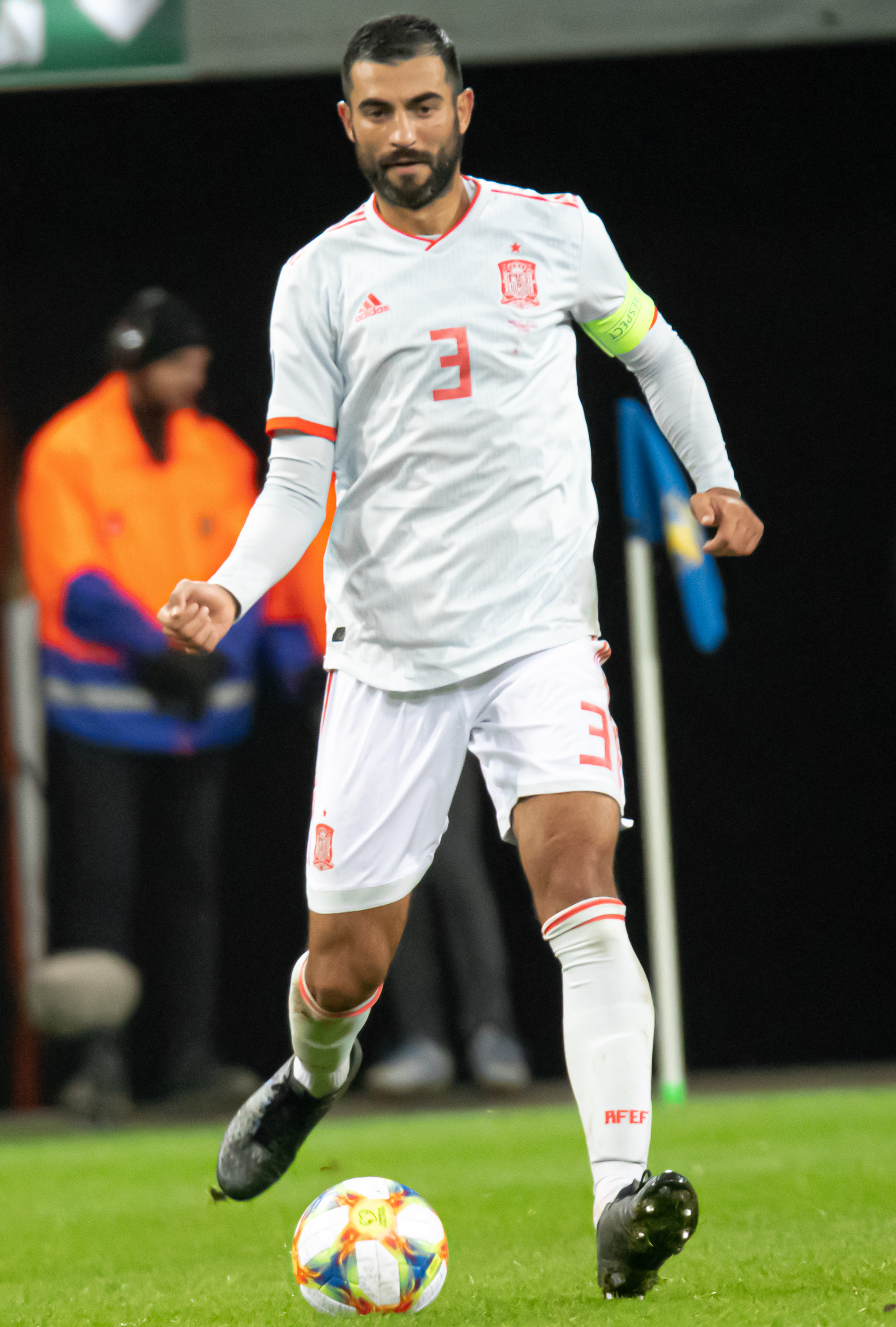 UEFA EURO qualifiers Sweden vs Spain 20191015